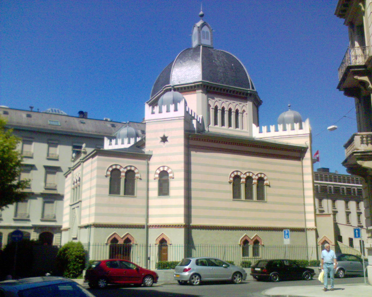 Synagogue Beth Yaacov de Genève (Suisse)